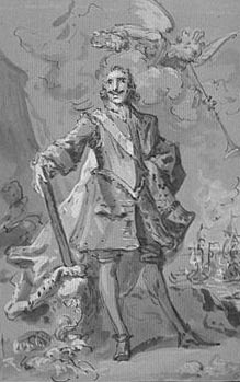 Pierre 1er Tsar d'après un dessin d'Oudry